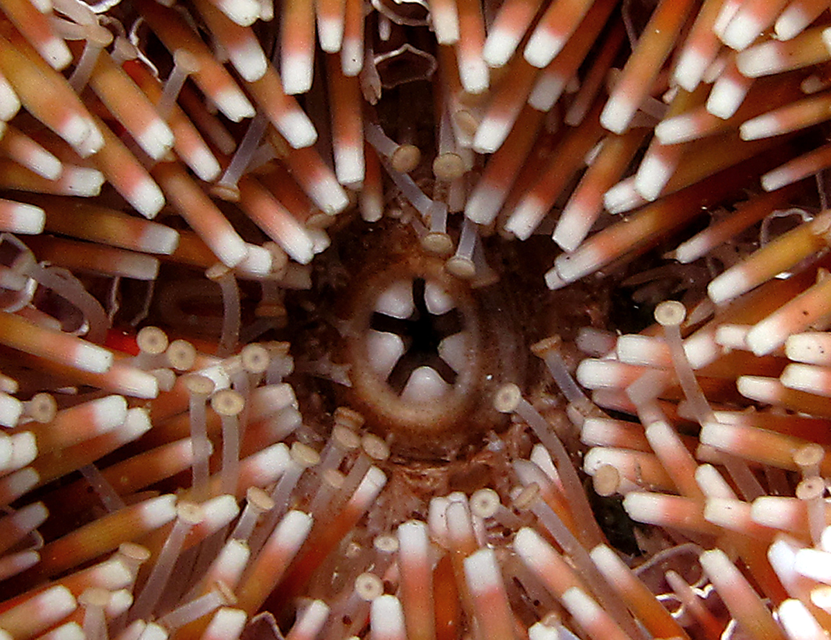 Gros plan sur les dents d'un oursin-fleur (Toxopneustes pileolus).